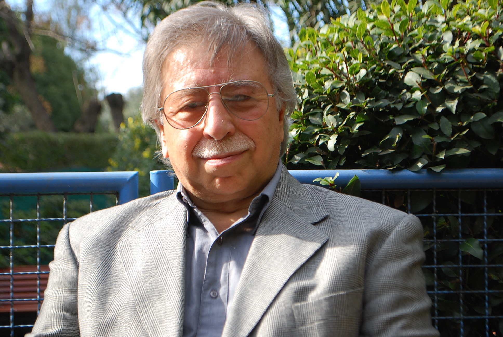 Osvaldo Guariglia